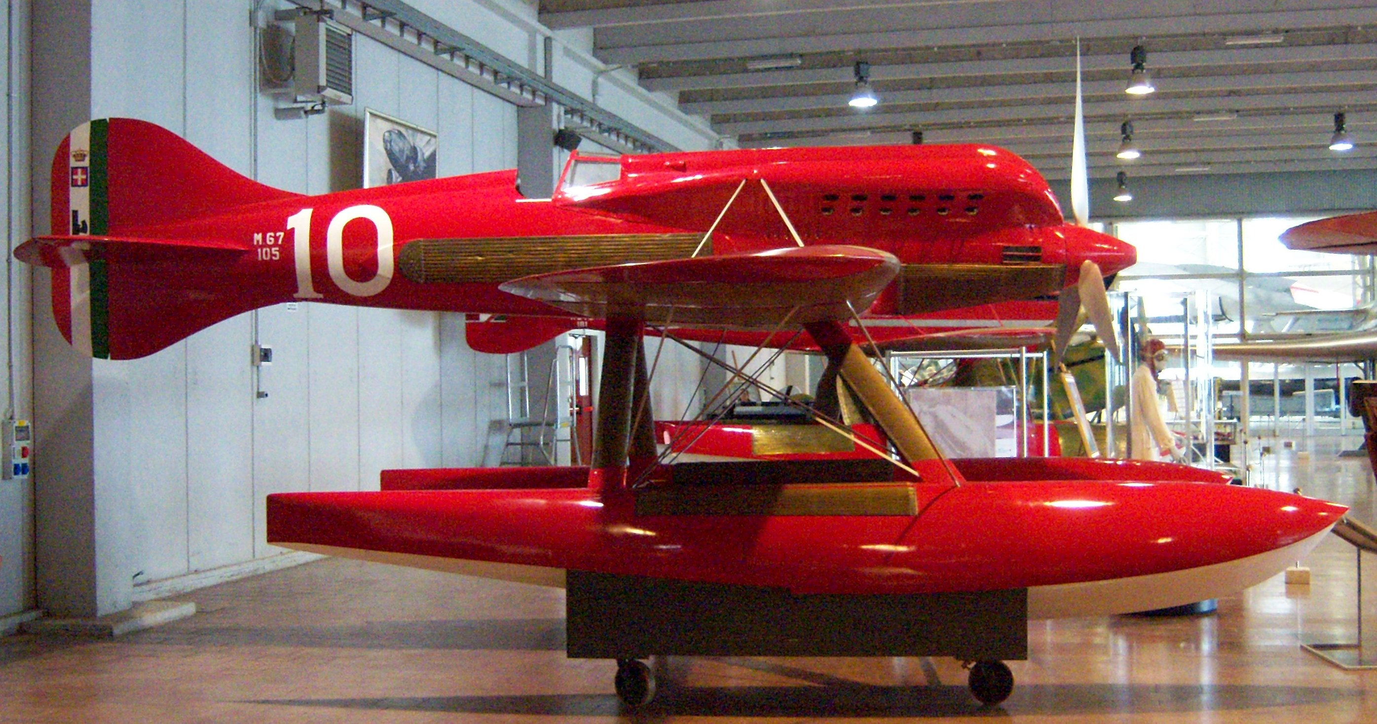 Macchi M.67 im Museo storico dell'Aeronautica Militare di Vigna di Valle